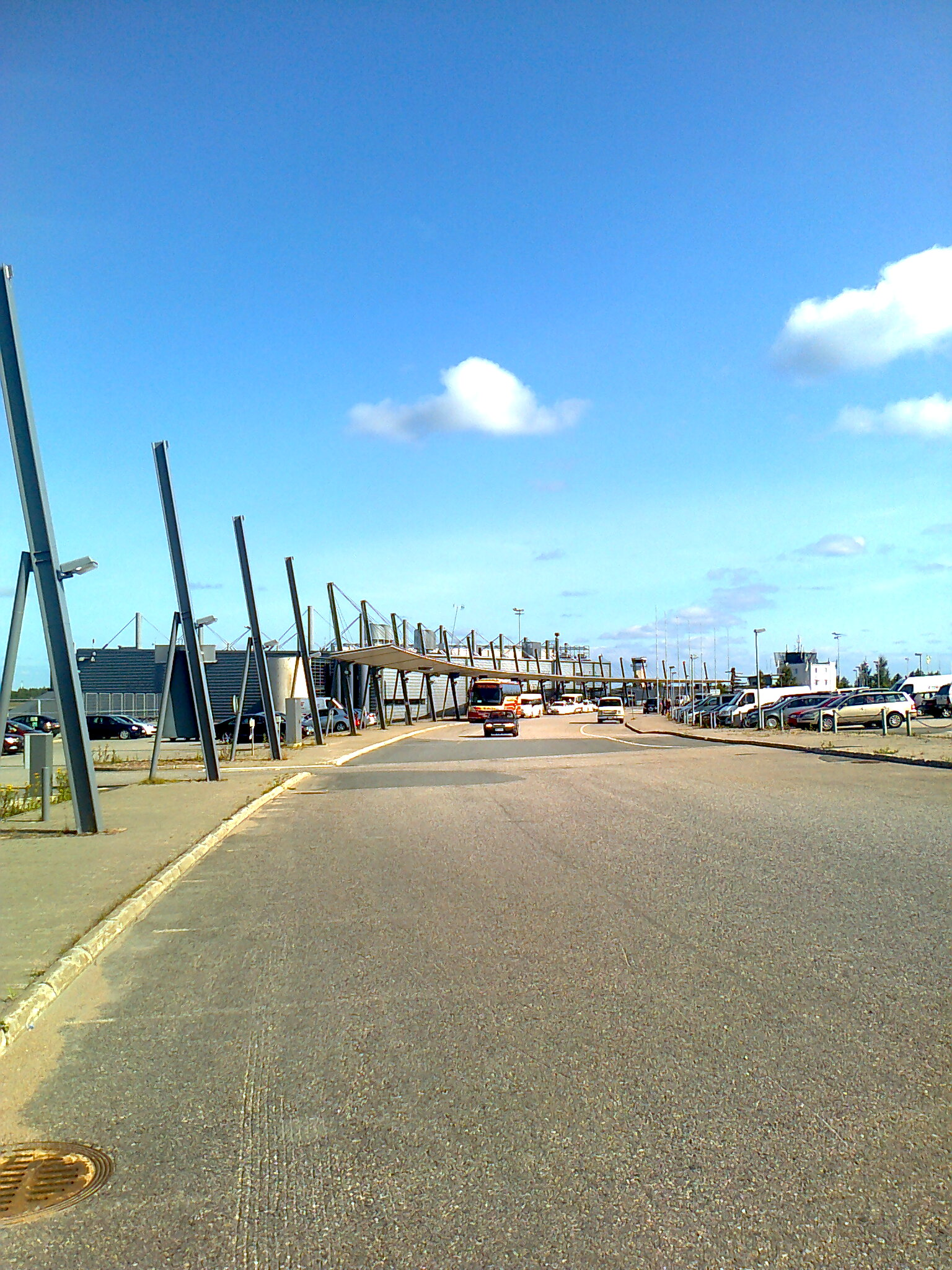 Rovaniemi lennujaam 2012. aasta suvel